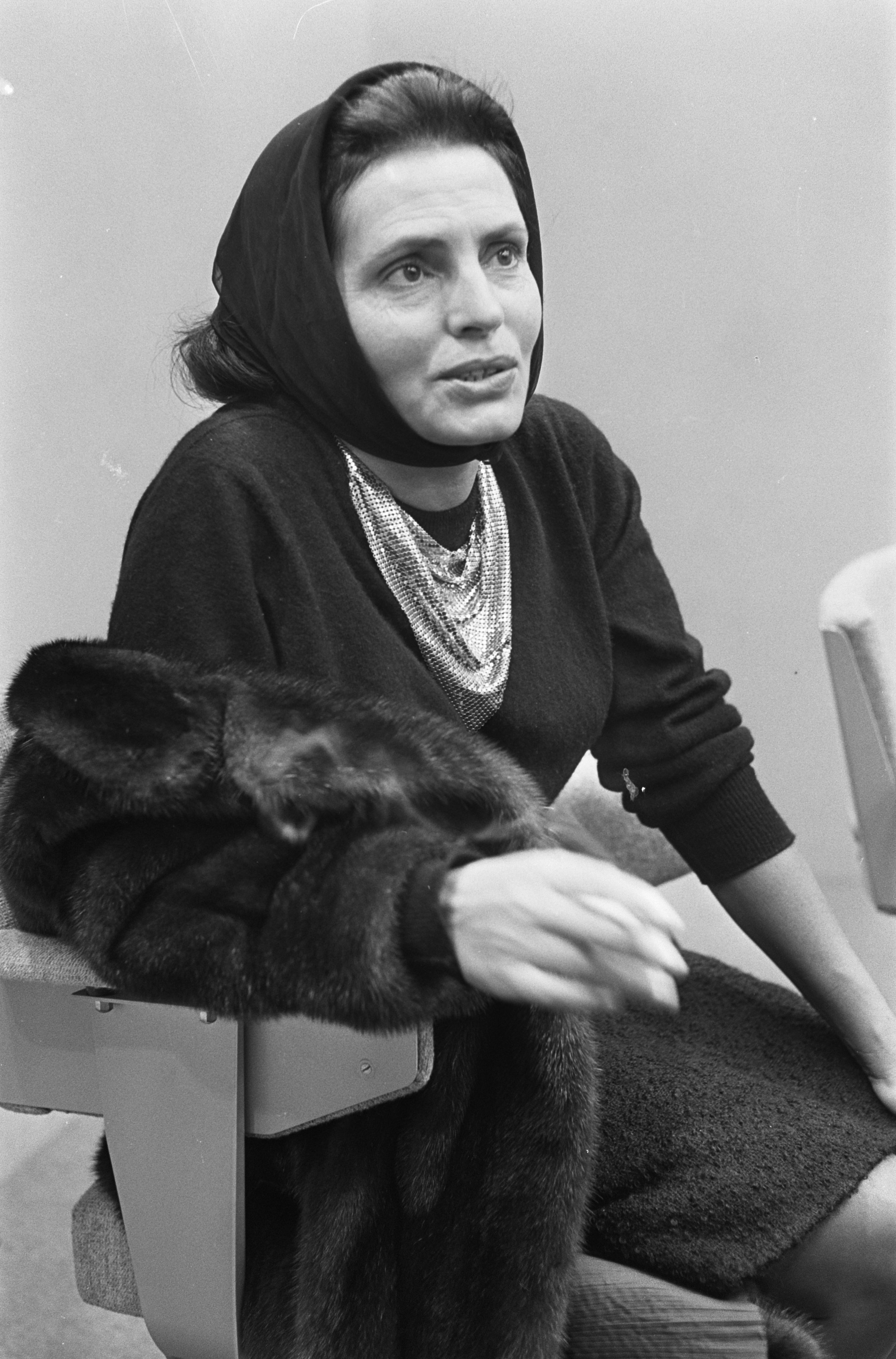 Collectie / Archief : Fotocollectie Anefo Reportage / Serie : [ onbekend ] Beschrijving : Amalia Rodrigues [Portugese fado-zangeres] op Schiphol Datum : 8 oktober 1964 Locatie : Noord-Holland, Schiphol Trefwoorden : portretten, zangeressen Persoonsnaam : Rodrigues, Amalia Fotograaf : Pot, Harry / Anefo Auteursrechthebbende : Nationaal Archief Materiaalsoort : Negatief (zwart/wit) Nummer archiefinventaris : bekijk toegang 2.24.01.05 Bestanddeelnummer : 916-9840